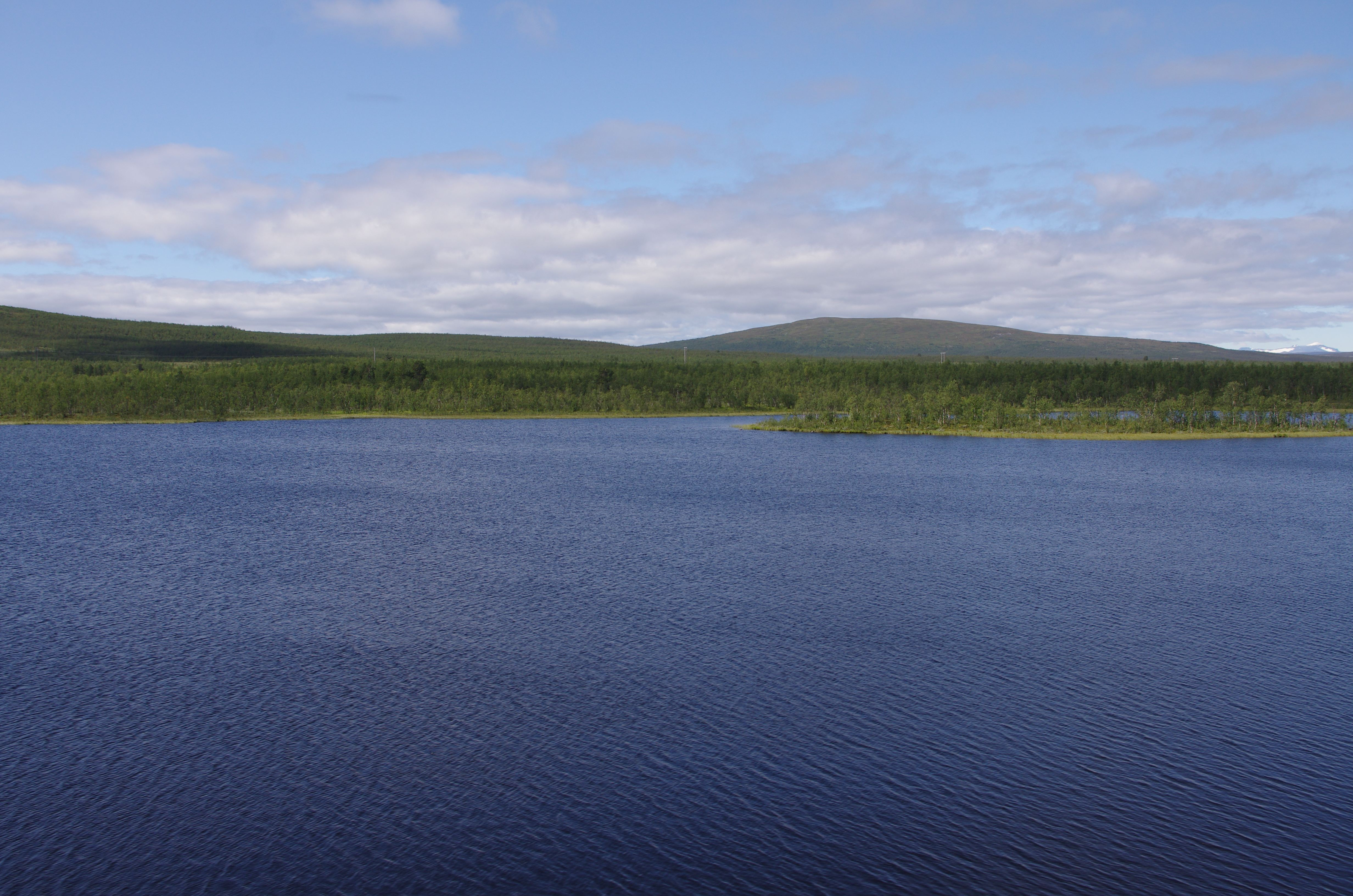 Sjön Maunajaure i Kiruna kommun i Lappalnd i Sverige åt sydväst.